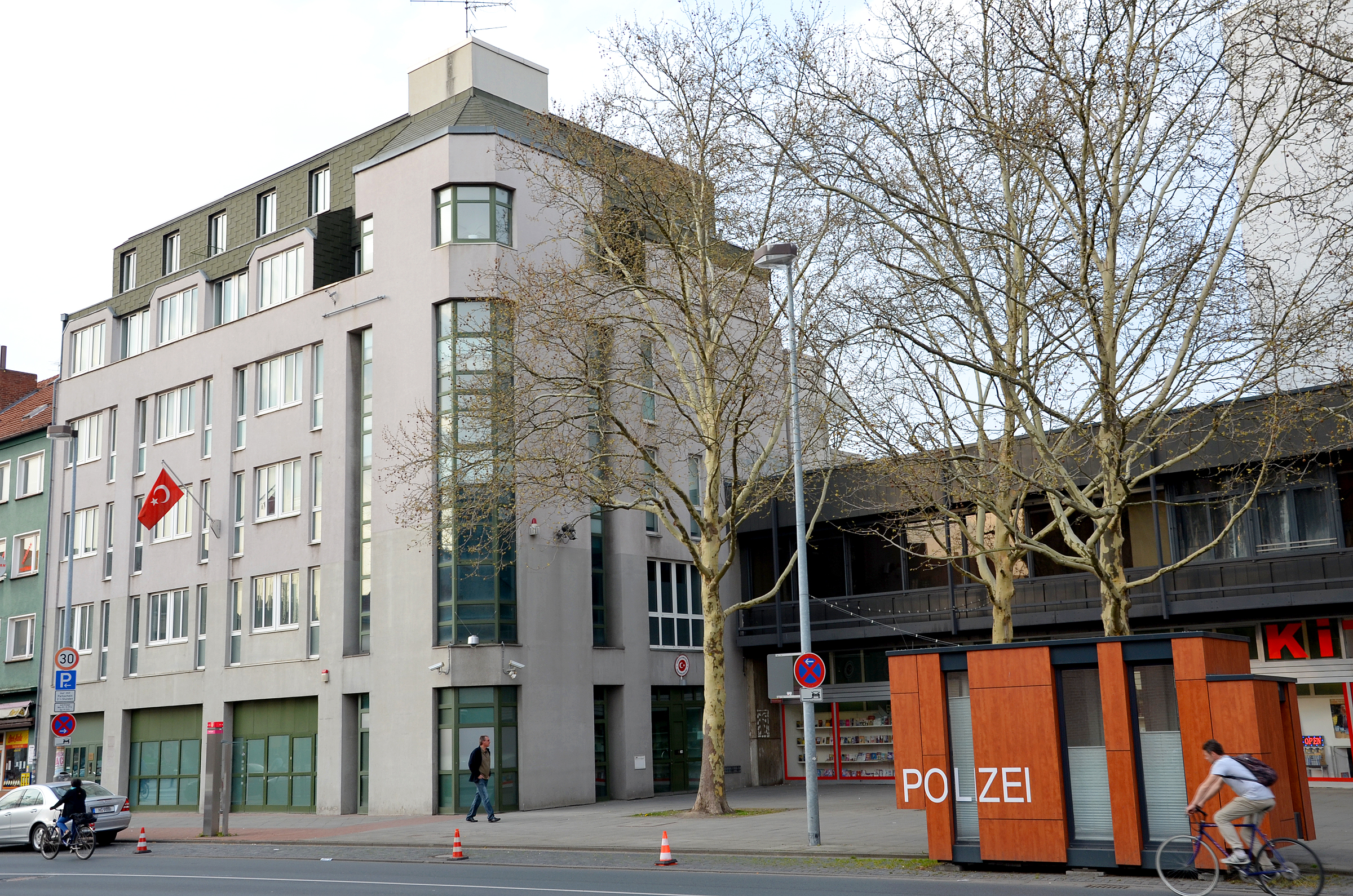 Die mobile Polizeiwache" für Schutzmaßnahmen am türkischen Generalkonsulat in Hannover (Adresse: An der Christuskirche 3) entwarf das Büro Gesamtkonzept - Architekten (Tim Frede, Tev Wilhelmsen). Der Container entstand in enger Absprache mit den Nutzern ...